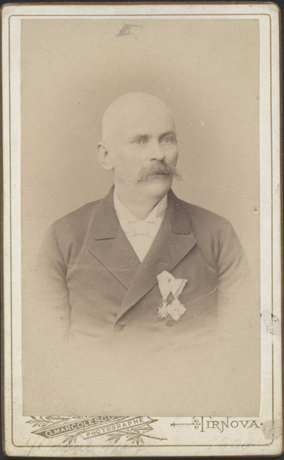 Христо Иванов Големия